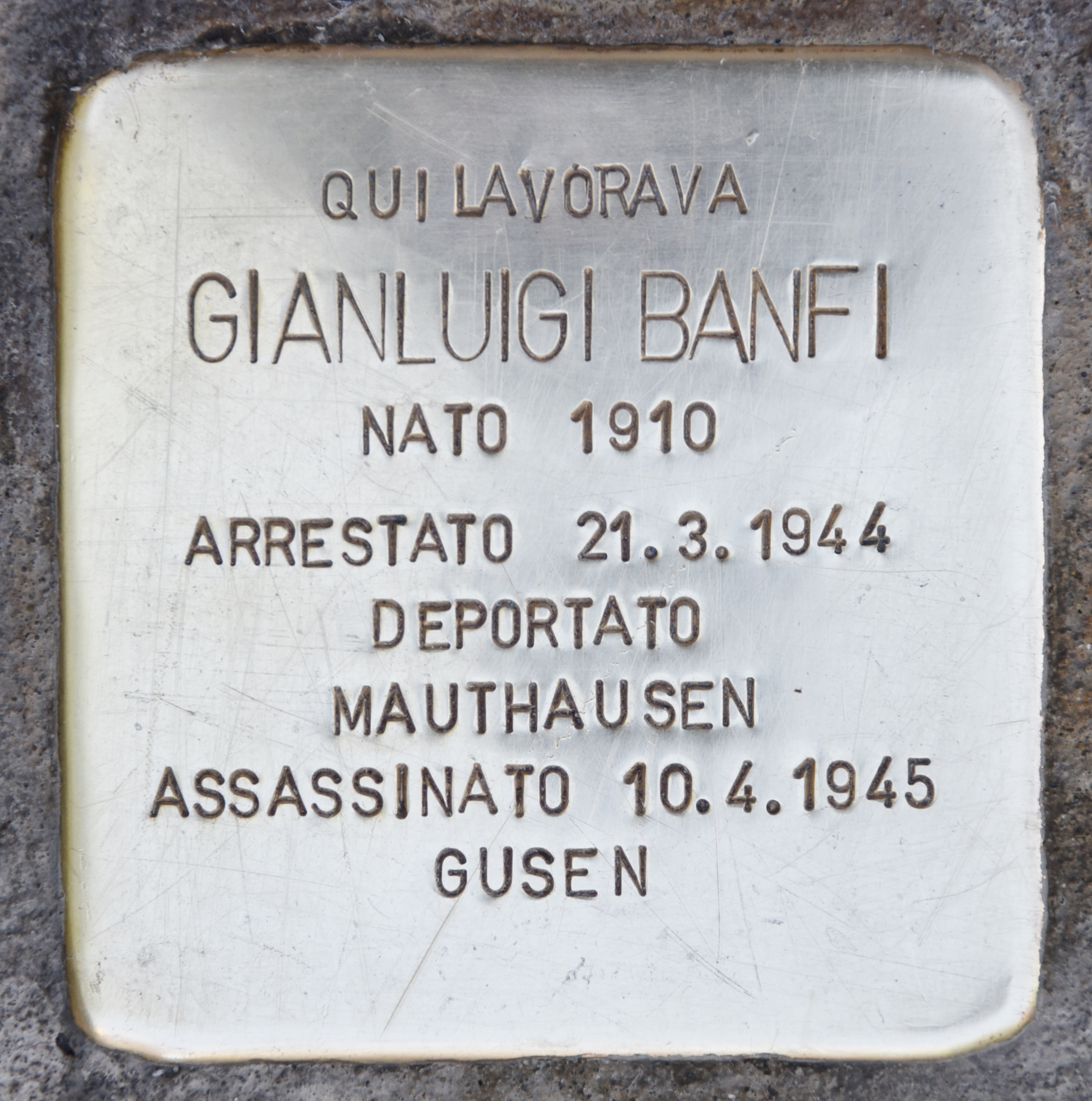 Stolperstein für Gianluigi Banfi. Mailand, via dei Chiostri 2.